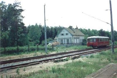 Ehemaliges Bahnwärterhaus Borne (Mark)Bf.